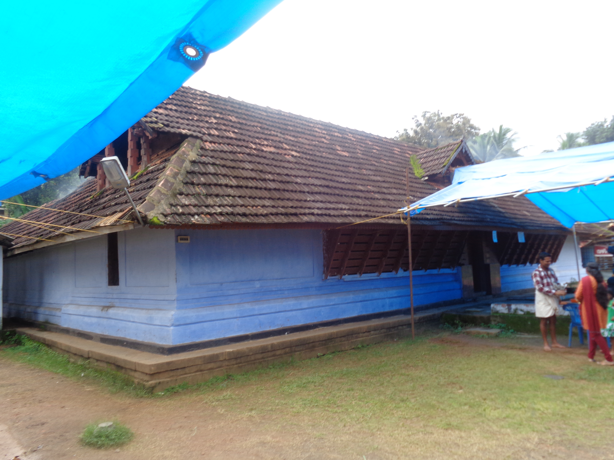 sri rama temple ramapuram, malappuram